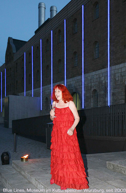 „Blue Lines“ am Museum im Kulturspeicher Würzburg, eine computergesteuerte Lichtinstallation aus Waltraut Coopers Werkserie „Digitale Poesie“, beauftragt für die Ausstellung „Ausgerechnet…. Mathematik und Konkrete Kunst“ 2008.